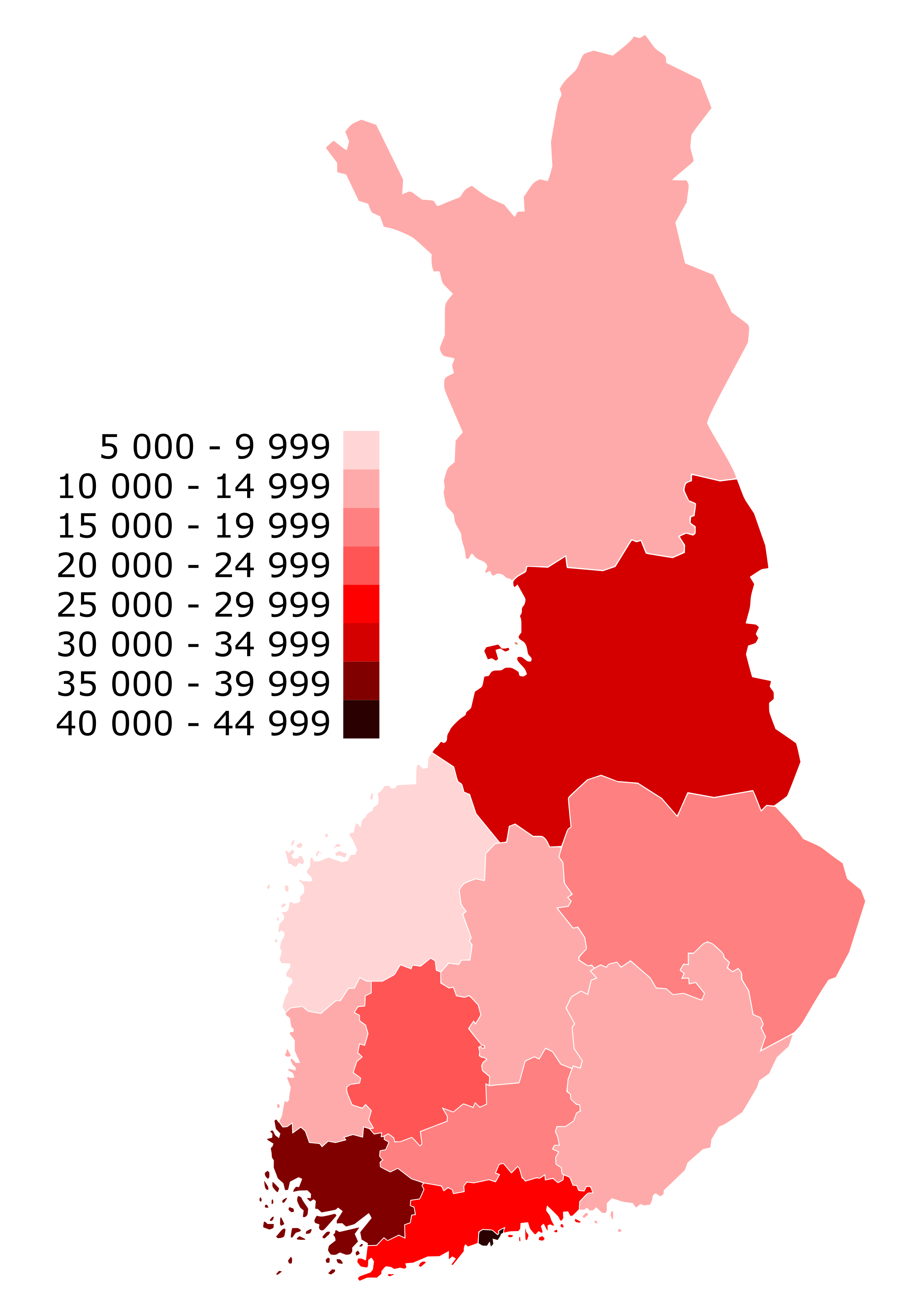 Vasemmistoliiton äänimäärä vaalipiireittäin eduskuntavaaleissa 2019.